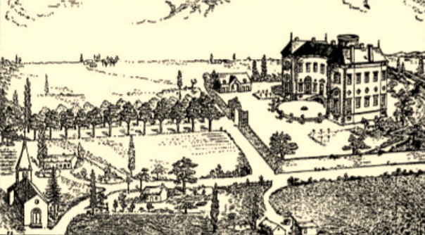 Château de Chateaurenaud avant sa destruction à partir de 1827